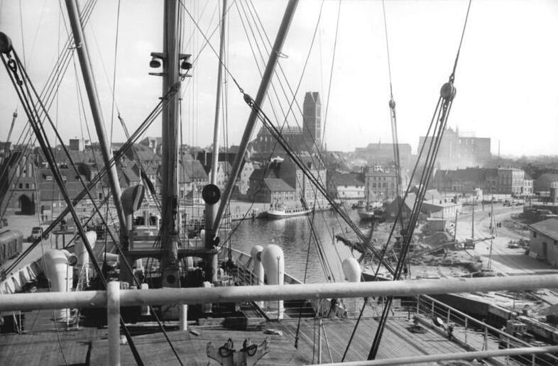 Wismar, Hafen Zentralbild Mellahn 18.4.1958 Frachtraum der DDR-Handelsflotte nahezu verdoppelt Der Frachtraum der volkseigenen Handelsflotte der DDR hat sich innerhalb der letzten drei Monate nahezu verdoppelt. Mit dem Kauf eines holländischen und zweier belgischer 10000-Tonnen-Motorschiffe erhöhte sich die Tonnagezahl auf etwa 50000 brt. UBz: Blick über das Achterdeck des Frachters "Theodor Körner" auf das Hafengelände in Wismar.